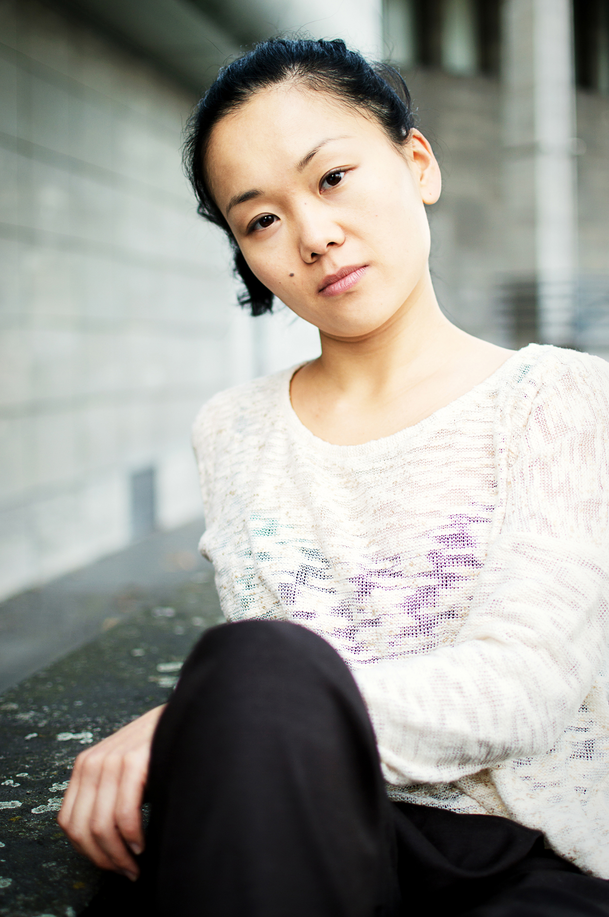 Yvonne Yung Hee Bormann - actress